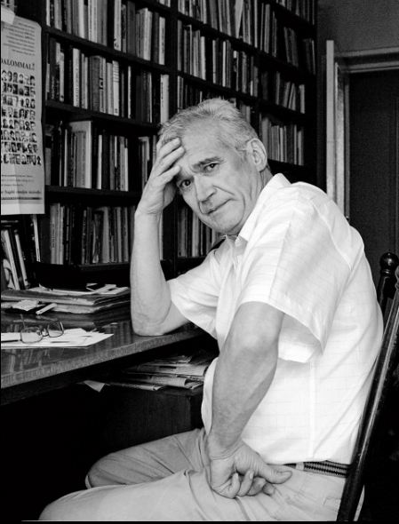 Farkas Árpád költő 2007-ben.